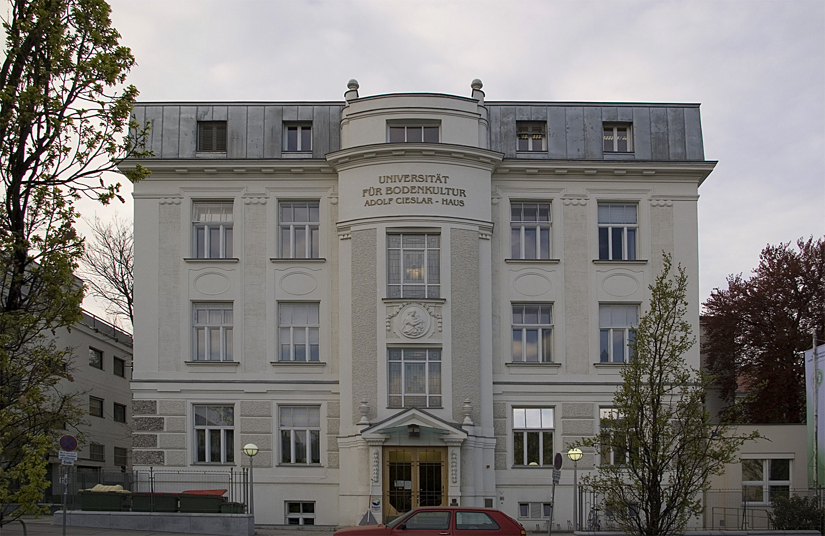 Cieslar Haus, Teil der BOKU Wien